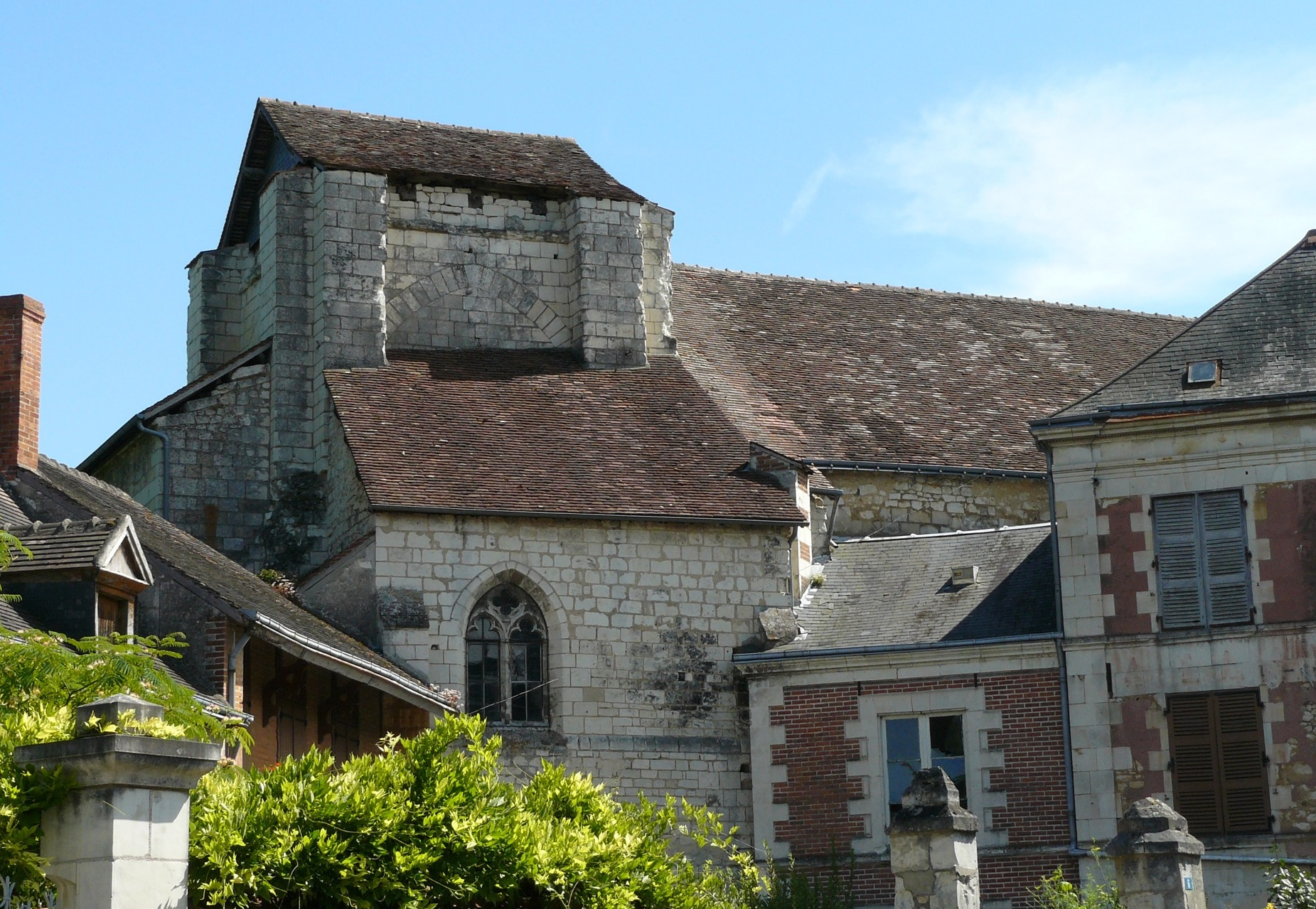 Clocher et nef de l'ancienne église Notre-Dame de Preuilly-sur-Claise